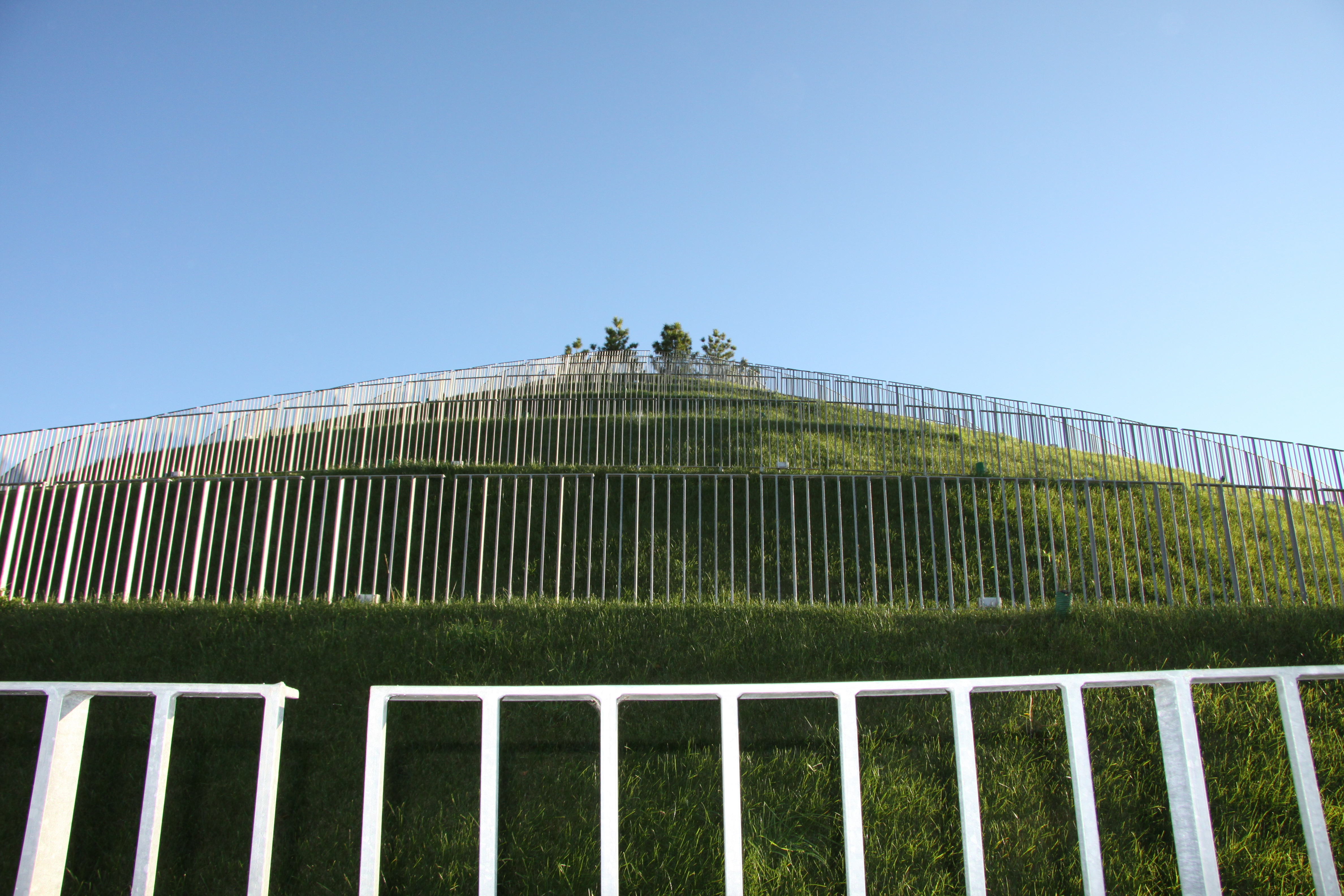 Vista dal basso della collina del parco.